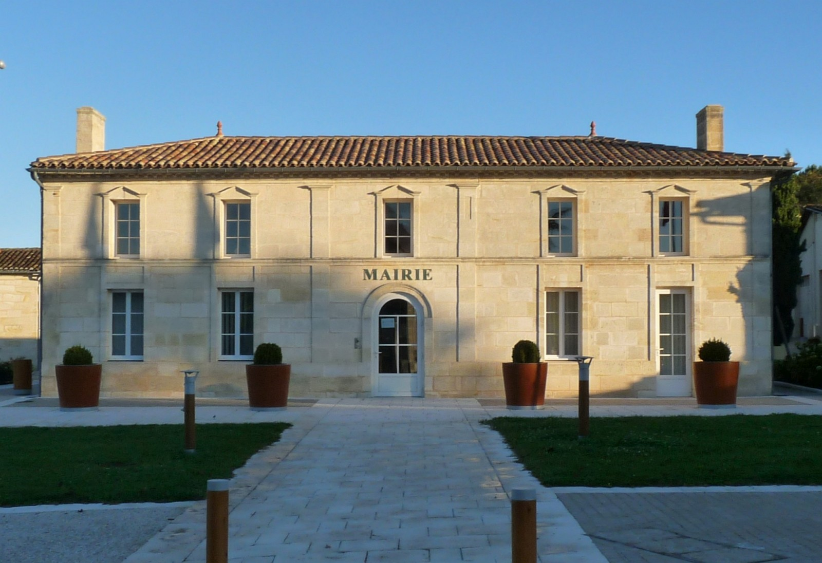 Mairie de Lapouyade, Gironde, France